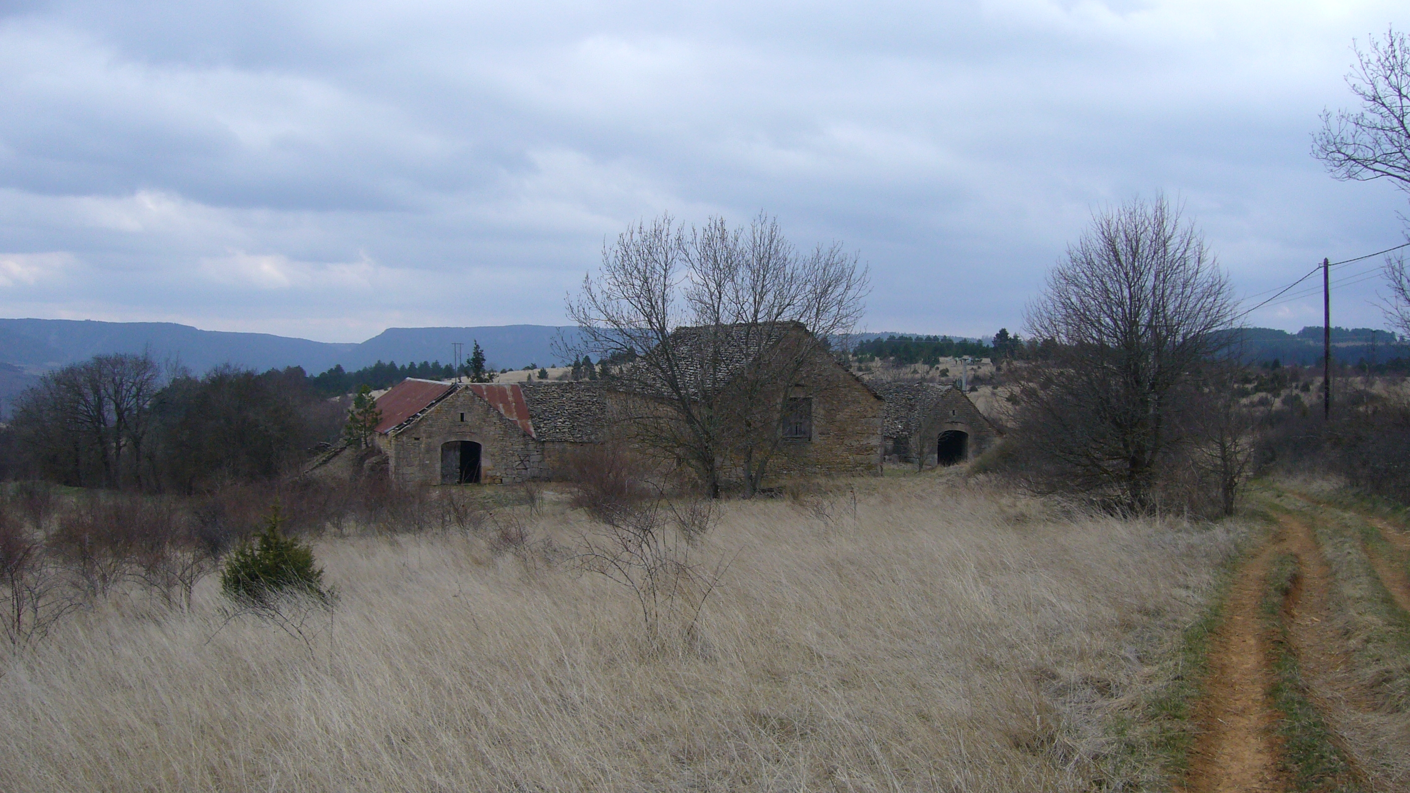 Ferme de Chapieu sur le mont-Mimat (Lanuéjols & Mende, Lozère, France)